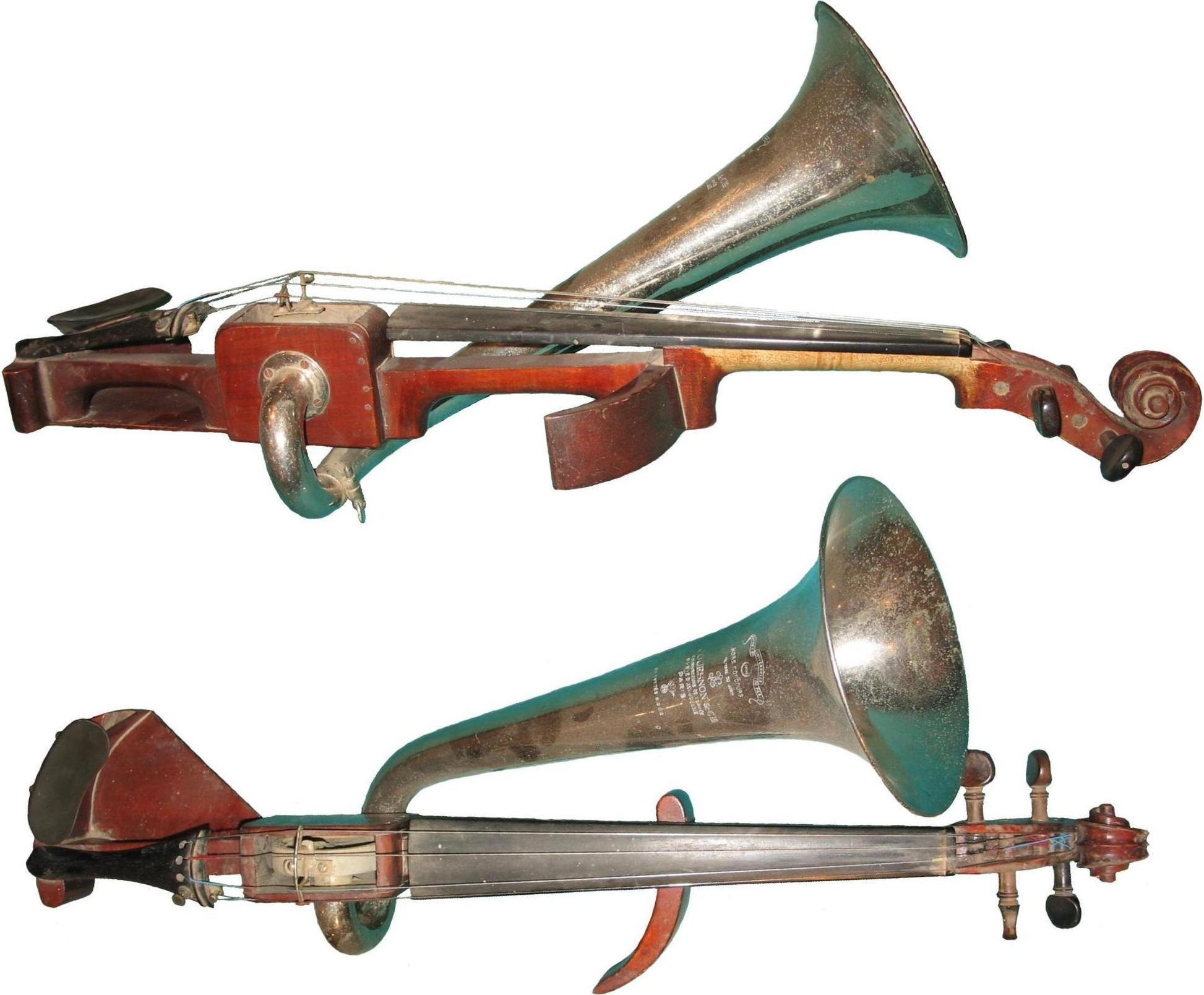 Violon de Jazz à pavillon de marque COUSNON, 1934